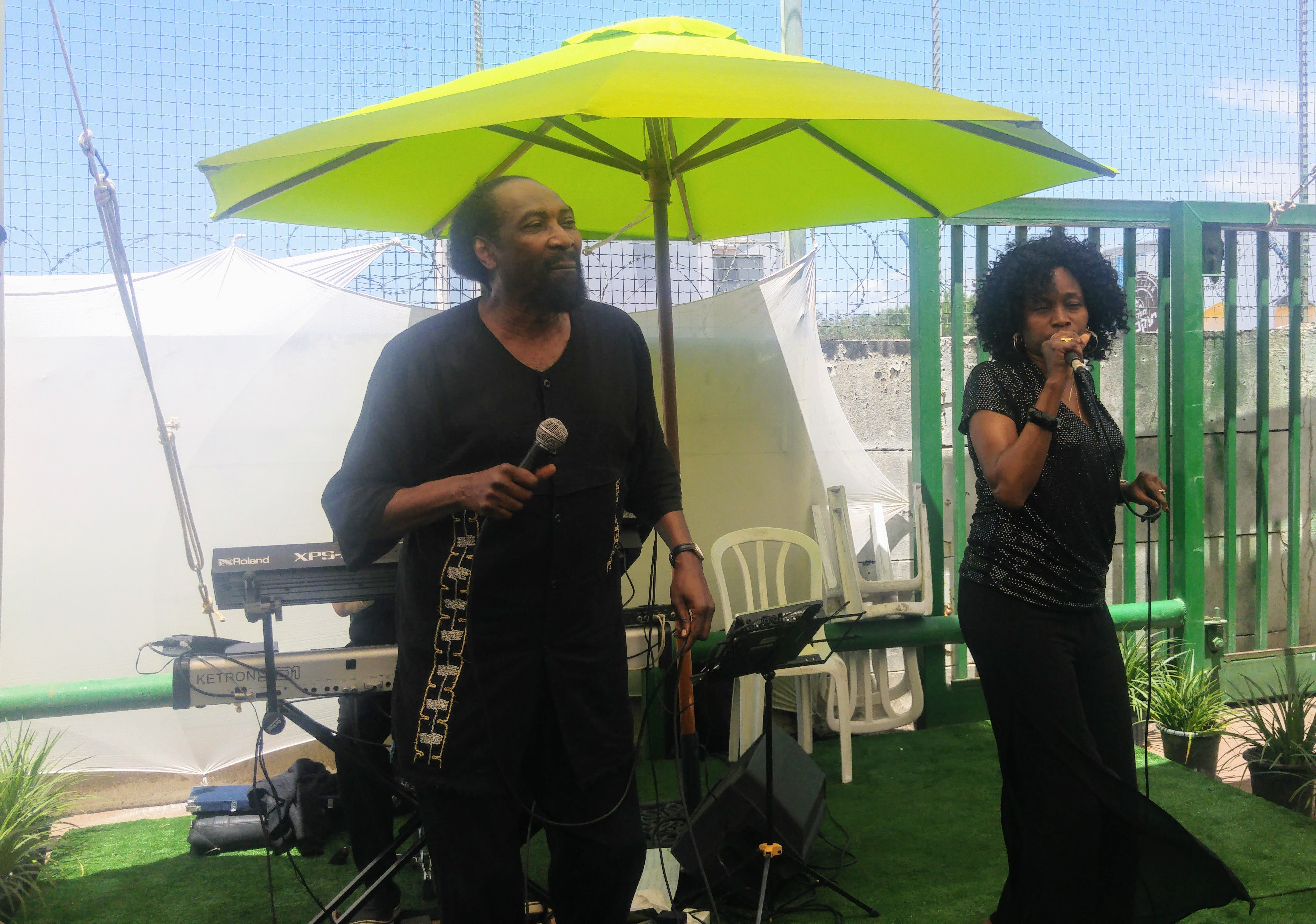 העבריים מדימונה בהופעה בעמק חפר מאי 2017